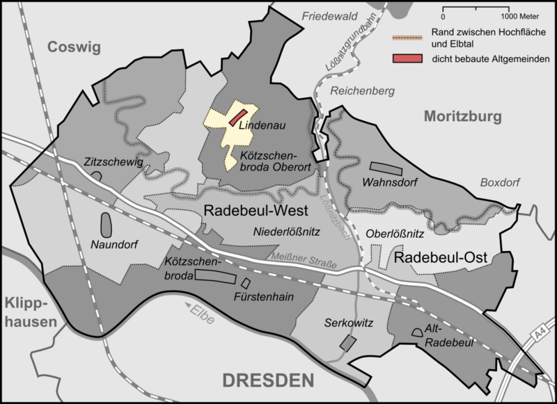 Karte der Stadtteile und Umlandgemeinden Radebeuls, hier Stadtteil Lindenau